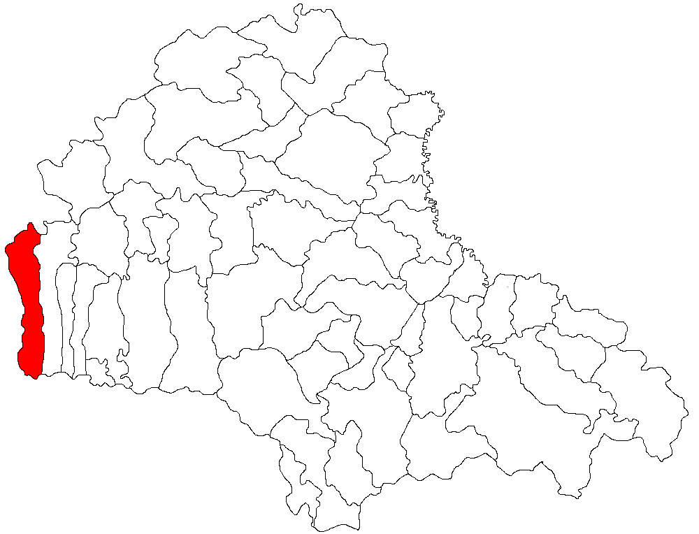 Categorie:Hărţi ale judeţului Braşov